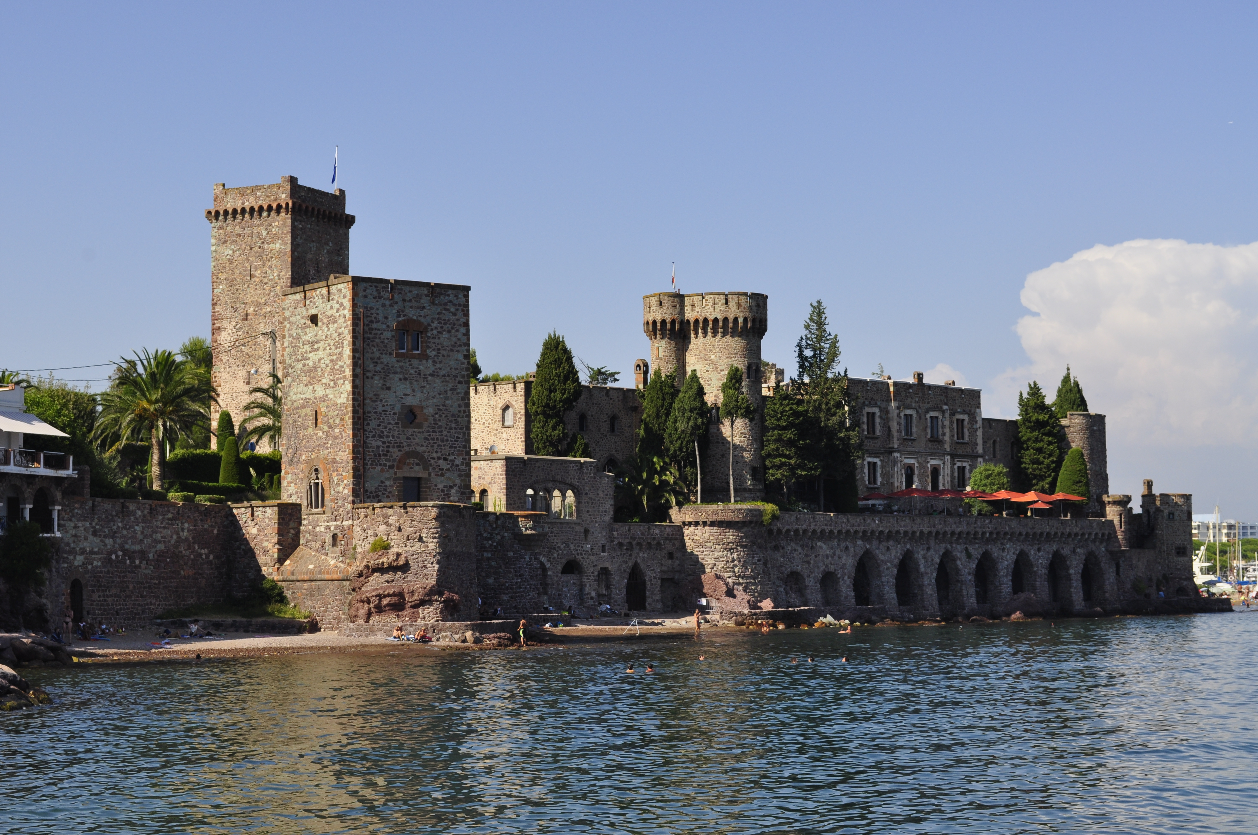 Vue du château de La Napoule depuis la plage de la Raguette.